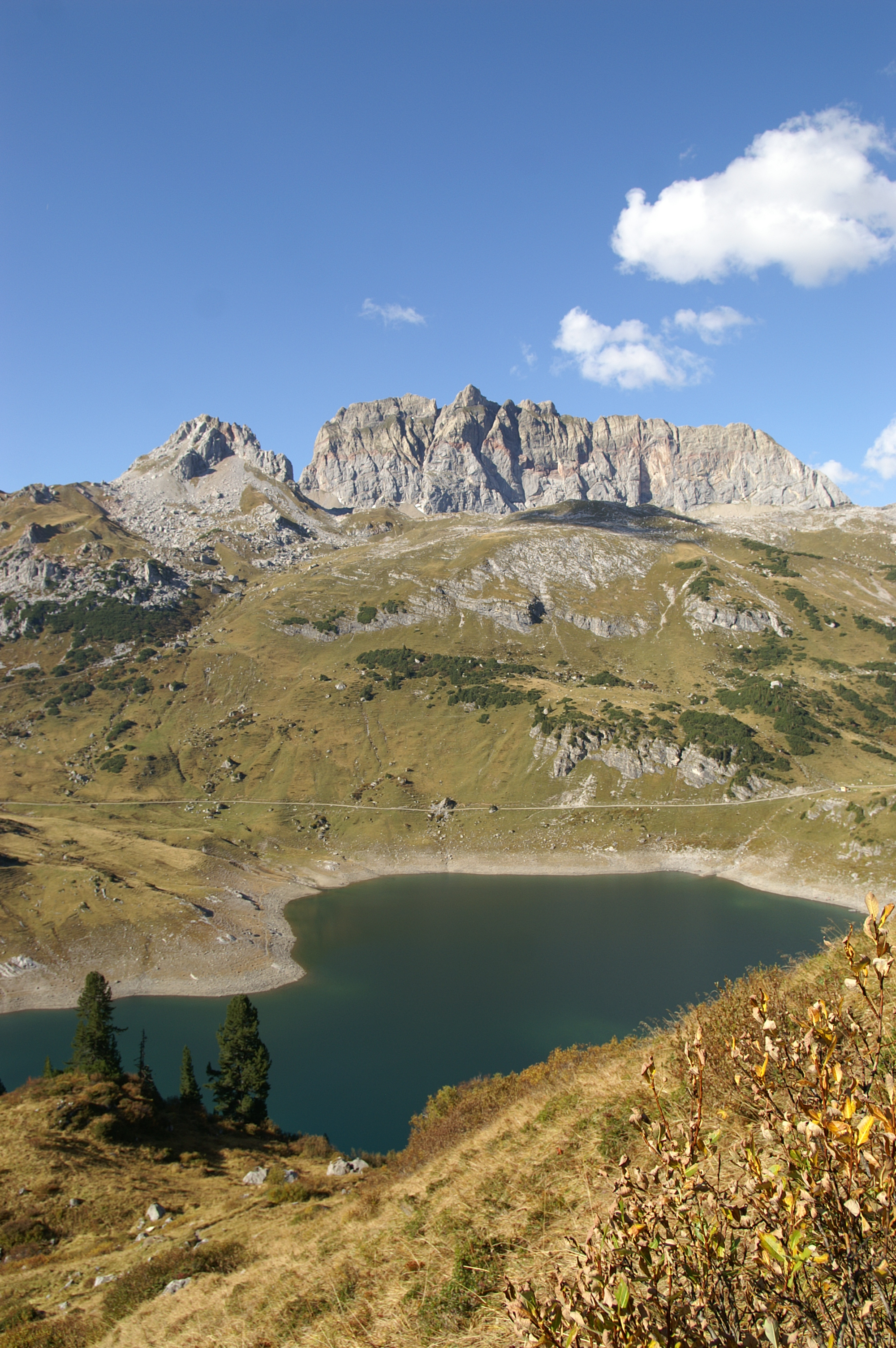 Blick von der Freiburger Hütte auf den Formarinsee im Lechquellengebirge auf die Südflanke der Roten Wand in Vorarlberg.